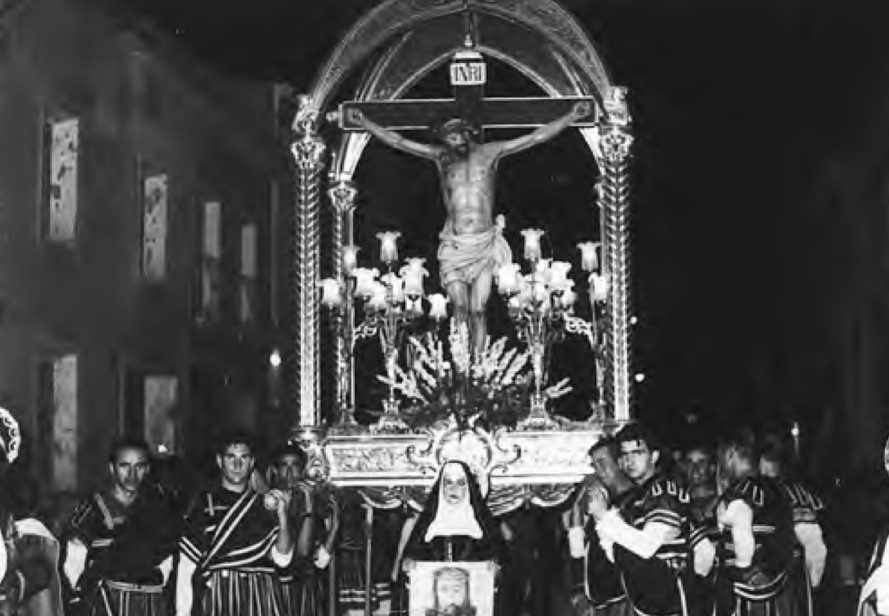 Aquesta és una imatge de la processó del Crist d'Albalat, durant l'any 1942